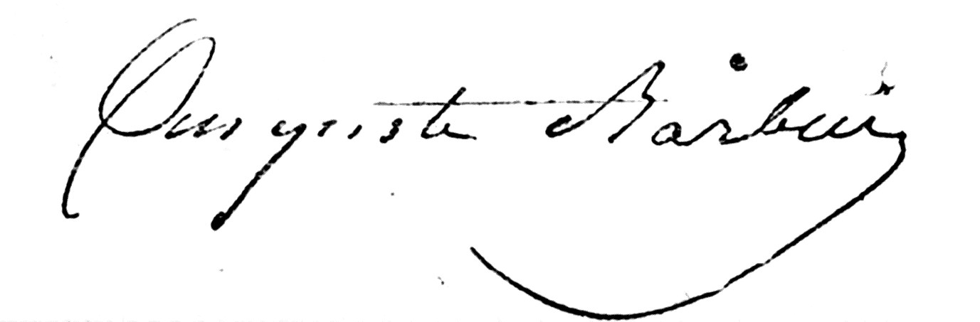 Signature Auguste Barbier